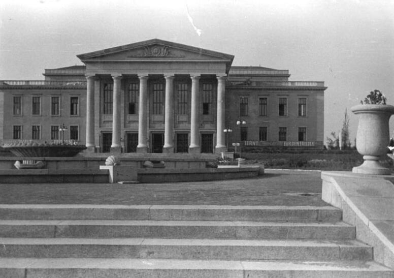 Chemnitz, Kulturpalast Illus Seidel 14.9.1951 Der Kulturpalast in Karl-Marx-Stadt.